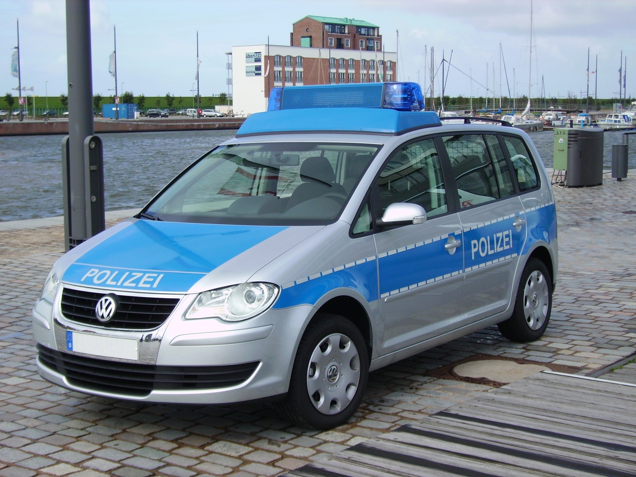 VW Touran-Funkstreifenwagen